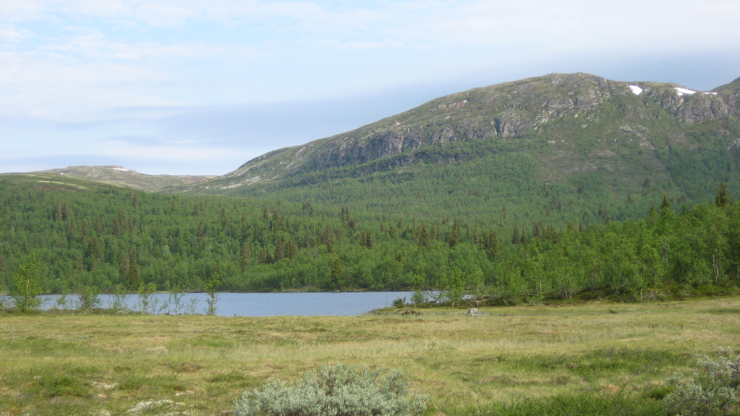 Storlægervatnet med Røssjøkollene bak